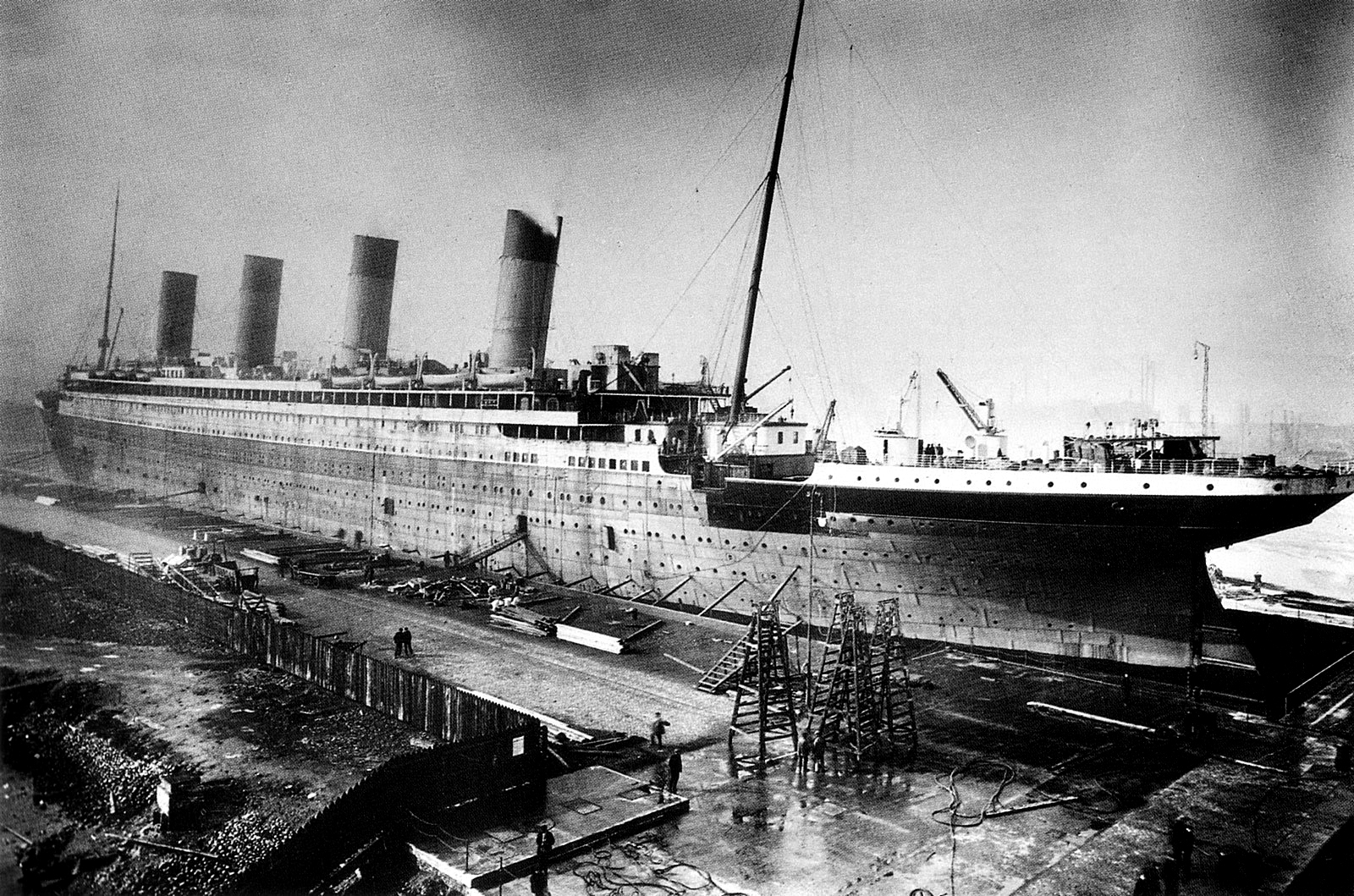 RMS Titanic under construction